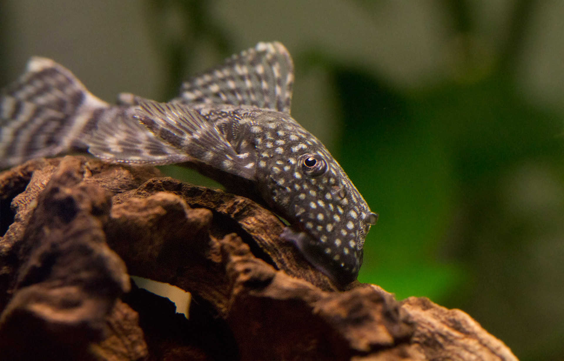 Ancistrus sp.(gemeiner Antennenwels, brauner Antennenwels), ca. zwei Monate alt, männlich